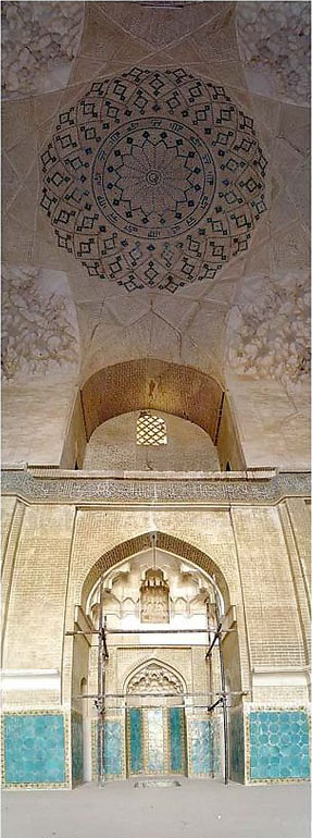 Malek mosque, Kerman, Iran.